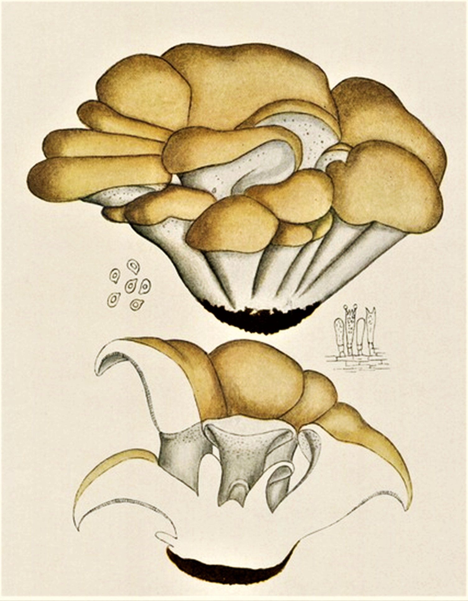 Giacomo Bresadola: Polyporus confluens (Alb. & Schwein., 1805) Fr. (1821), heute Albatrellus confluens (Alb. & Schw.) Kotl. & Pouzar (1957)